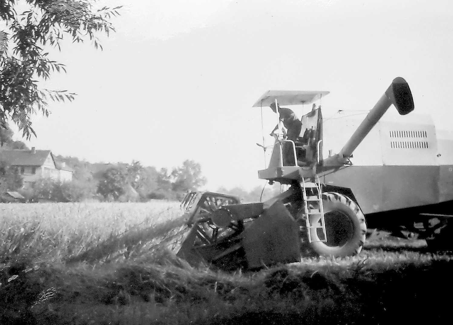 Getreideernte in der Jenaer Oberaue zwischen der Siedlung Neuwöllnitz und der Stadtrodaer Straße; Blick nach Neuwöllnitz; um 1970. Das Foto wurde im Sommer 1970 oder 1971 gemacht. Standort des Fotografen: nahe dem heutigen Straßenbahn- Übergang südlich der Sachsensümpfe.